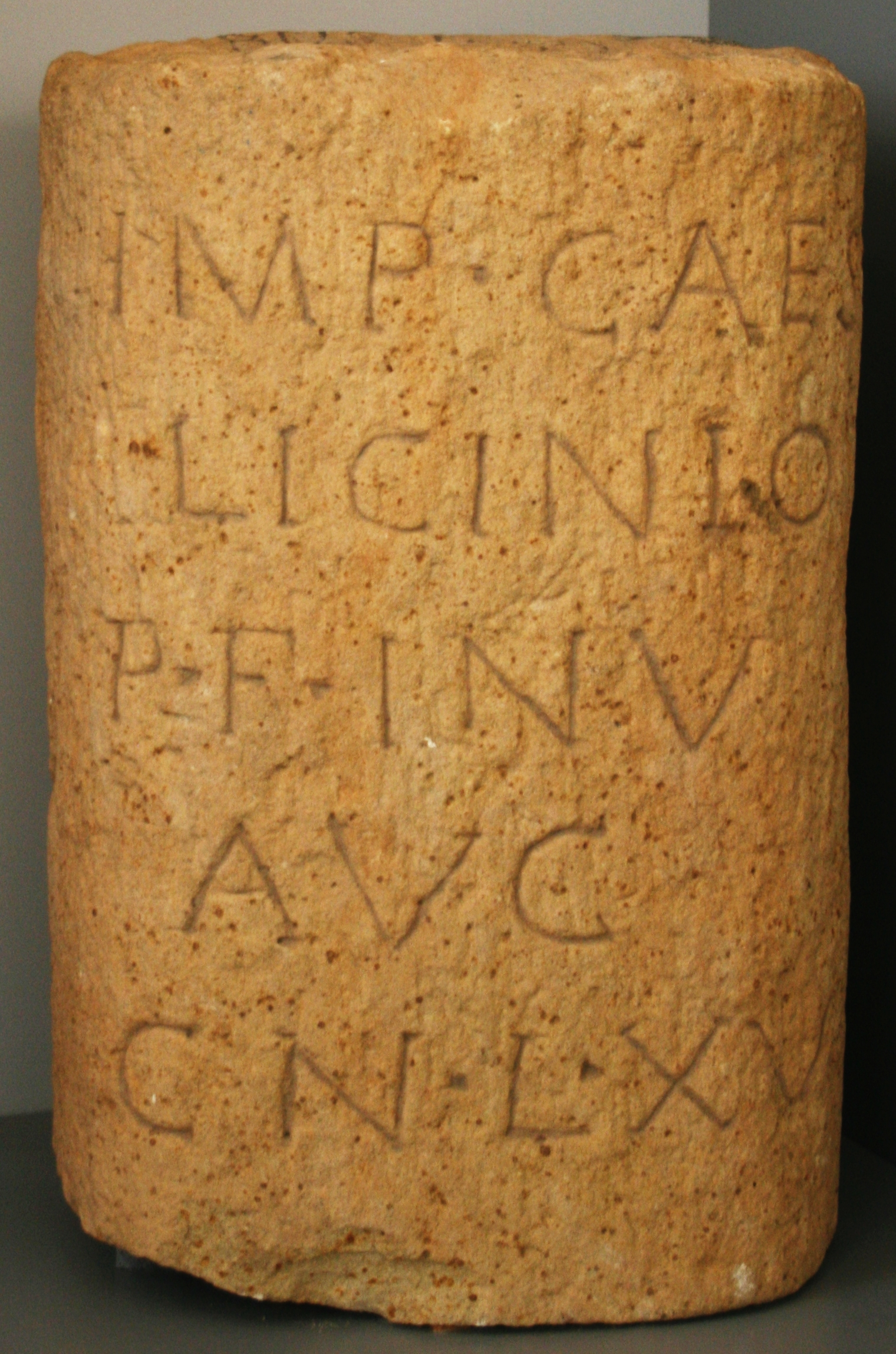 Römischer Leugenstein von Hagenbach, Kopie im Terra-Sigillata-Museum Rheinzabern(CIL XVII2, 00607).